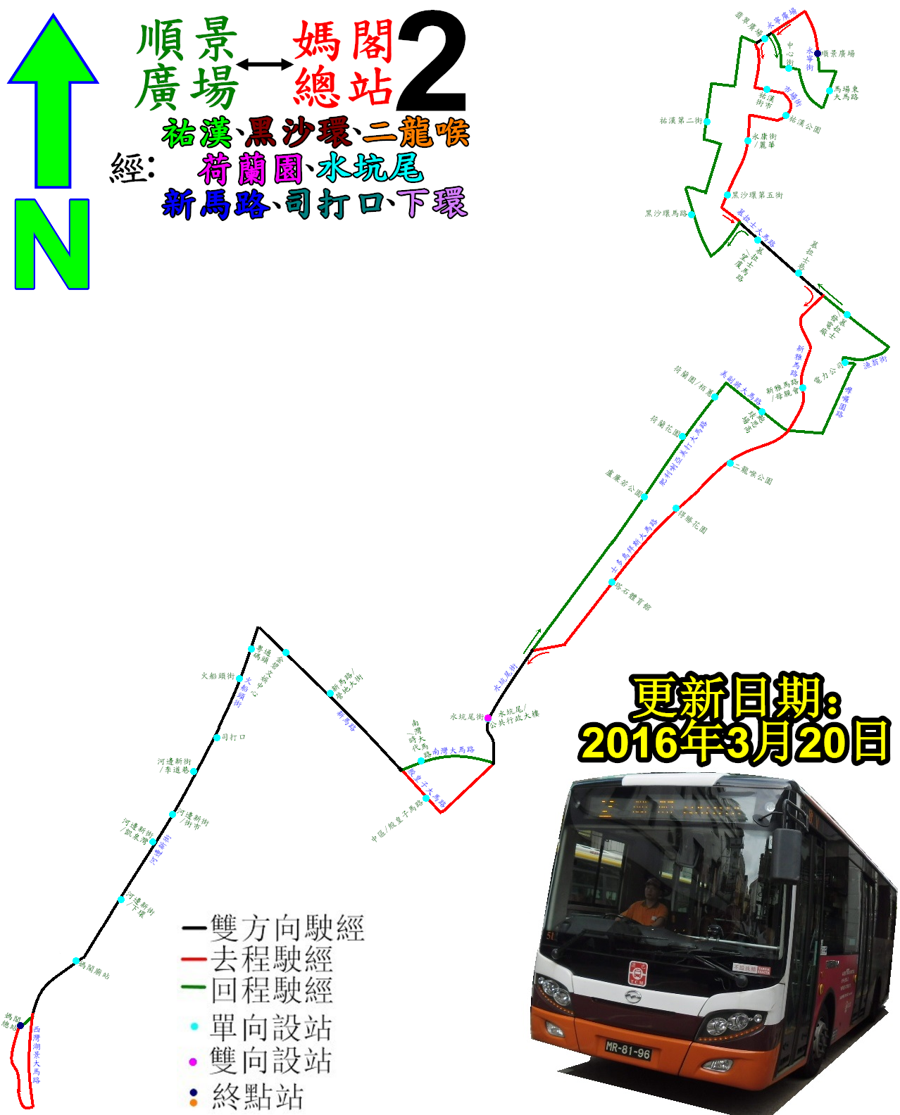 中文（香港）: 澳門巴士2路公車的走線圖